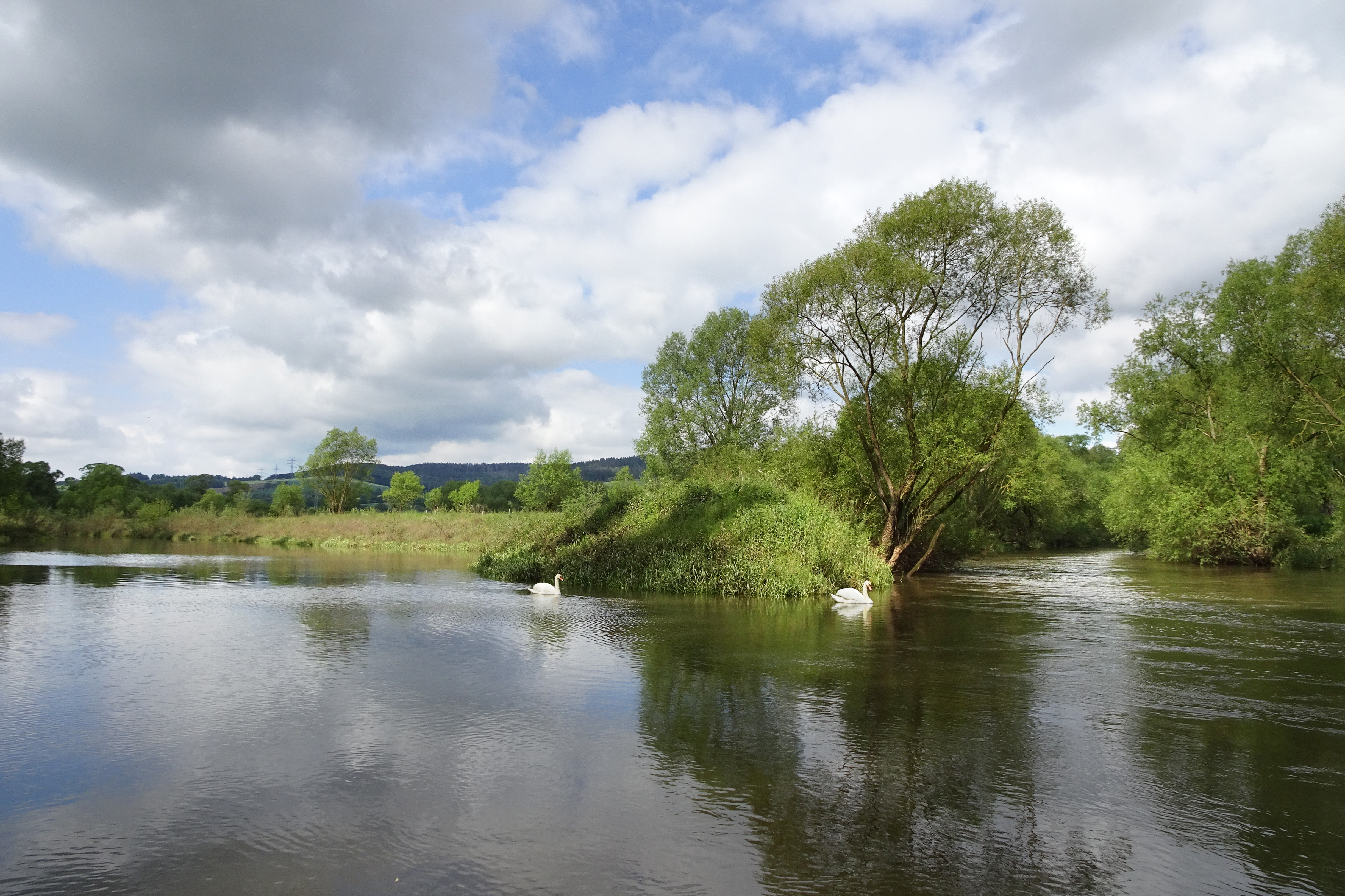 Die „Alte Fulda bei Blankenheim“ ist ein Altwasserbiotop am Mittellauf der Fulda nordöstlich der Gemeinde Blankenheim, einem Stadtteil von Bebra im Landkreis Hersfeld-Rotenburg. Als regional bedeutende Lebensstätte brütender und „Trittstein" für durchziehende Vogelarten ist der im Dezember 1981 zum Naturschutzgebiet erklärte Bereich aus ornithologischer Sicht von großer Bedeutung. Das Naturschutzgebiet liegt vollständig in dem Flora-Fauna-Habitat-Gebiet 5024-305 „Auenwiesen von Fulda, Rohrbach und Solz“, EU-Vogelschutzgebiet 5024-401 „Fuldatal zwischen Rotenburg und Niederaula“ und Landschaftsschutzgebiet „Auenverbund Fulda“. This is a picture of the protected area listed at WDPA under the ID 81266